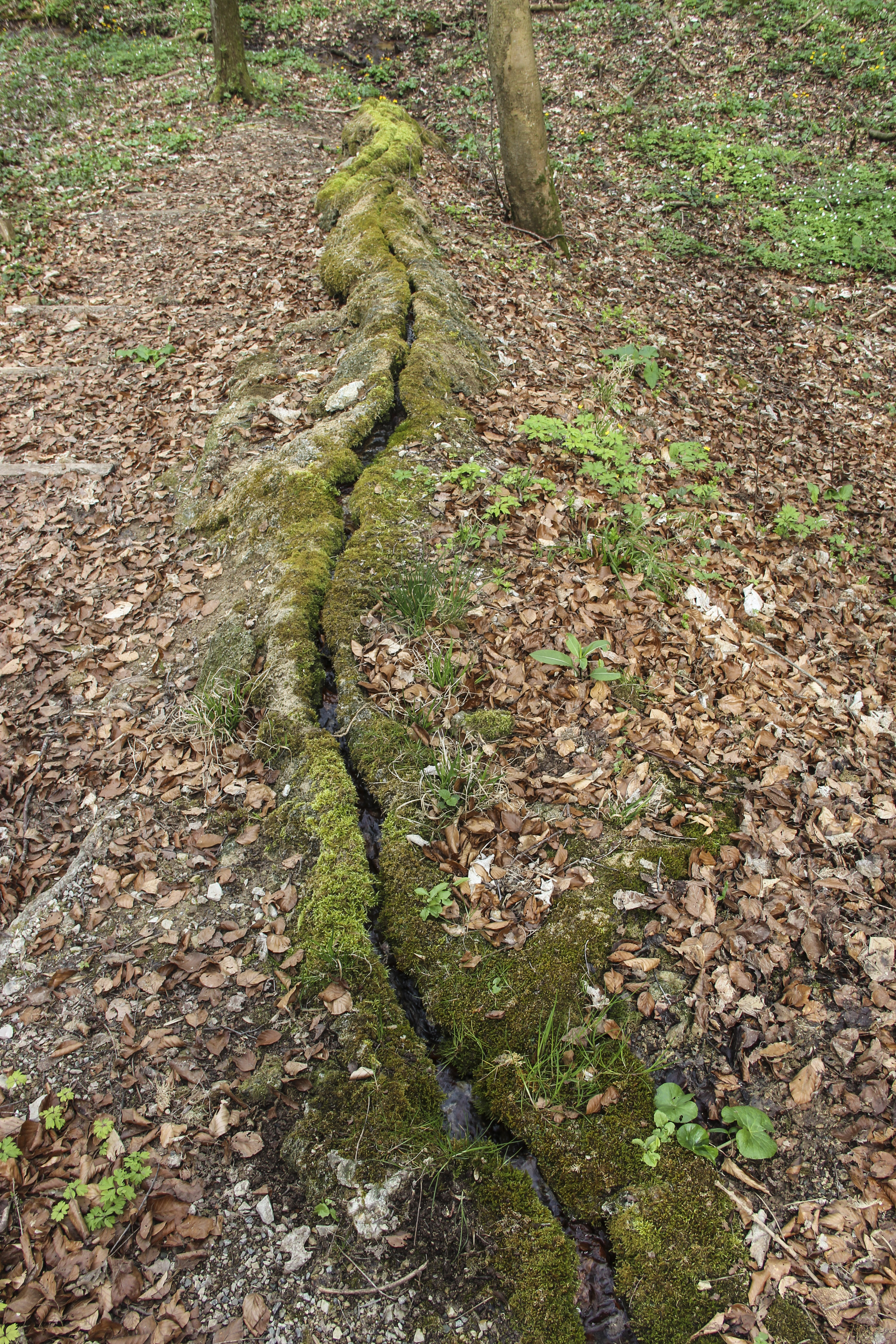 Steinerne Rinne, Hechlingen